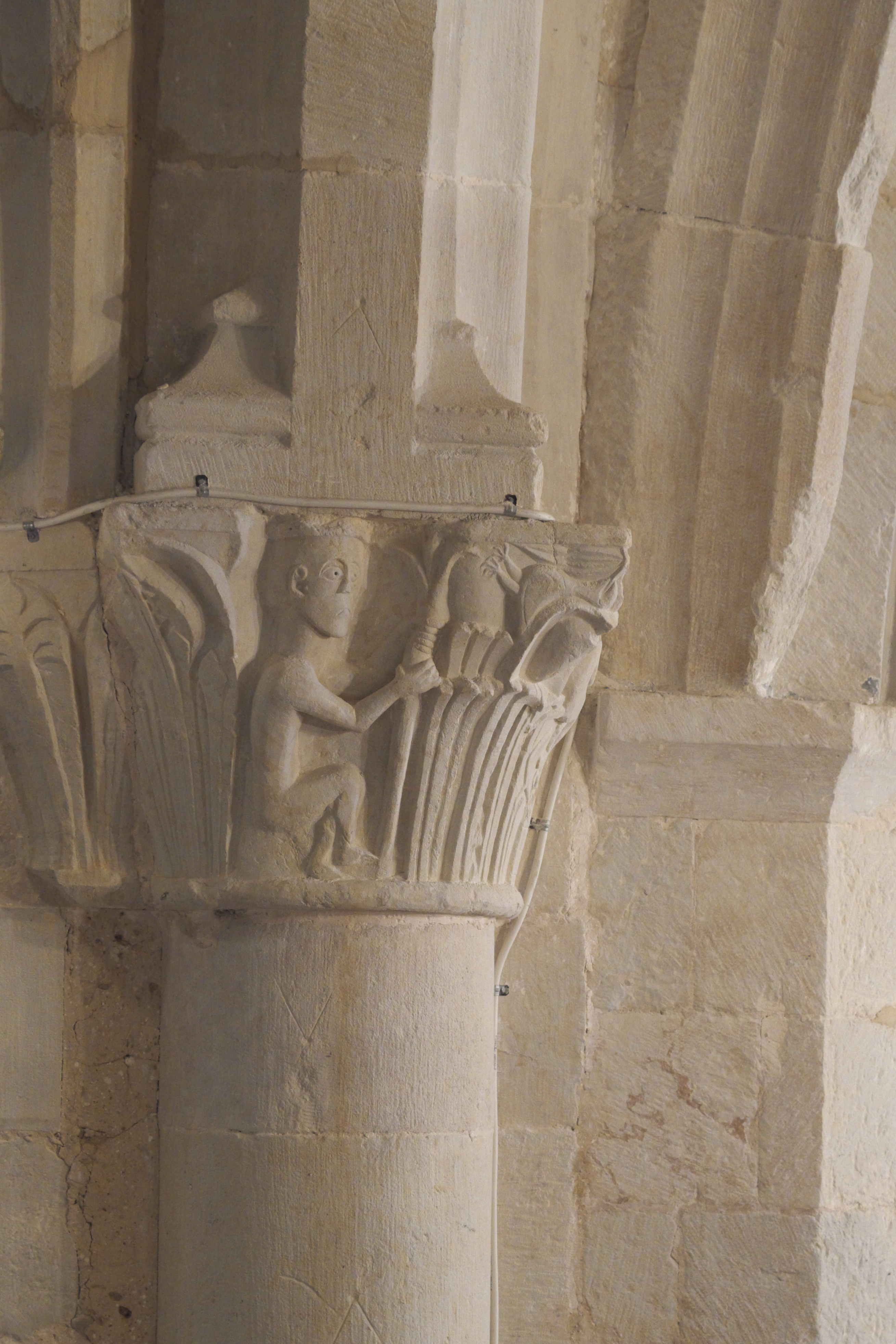 Kirche San Fructuoso Mártir in Colmenares de Ojeda (Dehesa de Montejo) in der Provinz Palencia (Kastilien-León/Spanien), Kapitell